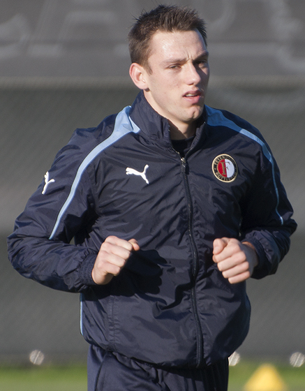 Stefan de Vrij training with Feyenoord.